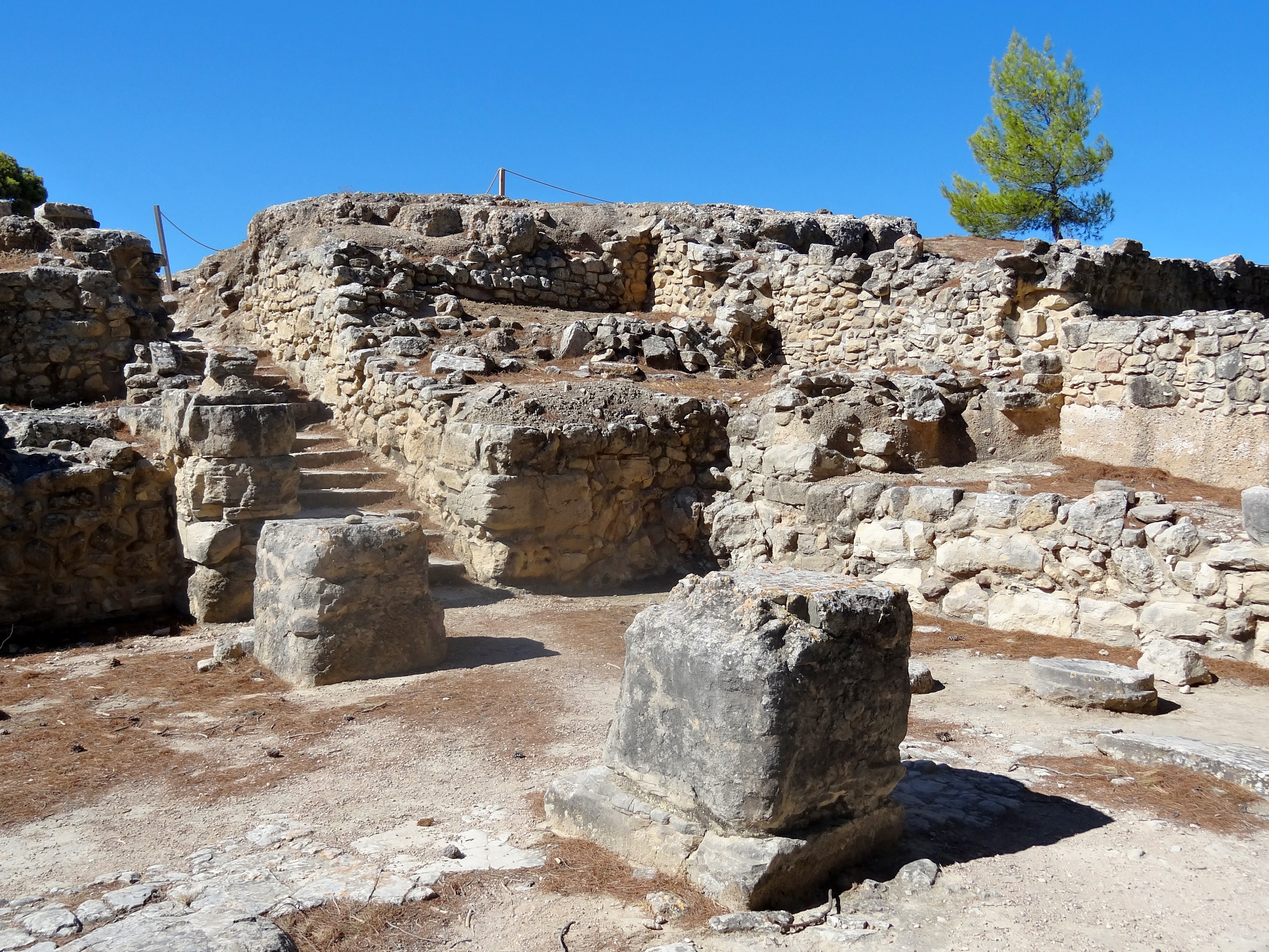 Palast von Phaistos (Φαιστός), Gemeinde Festos, Regionalbezirk Iraklio, Kreta, Griechenland